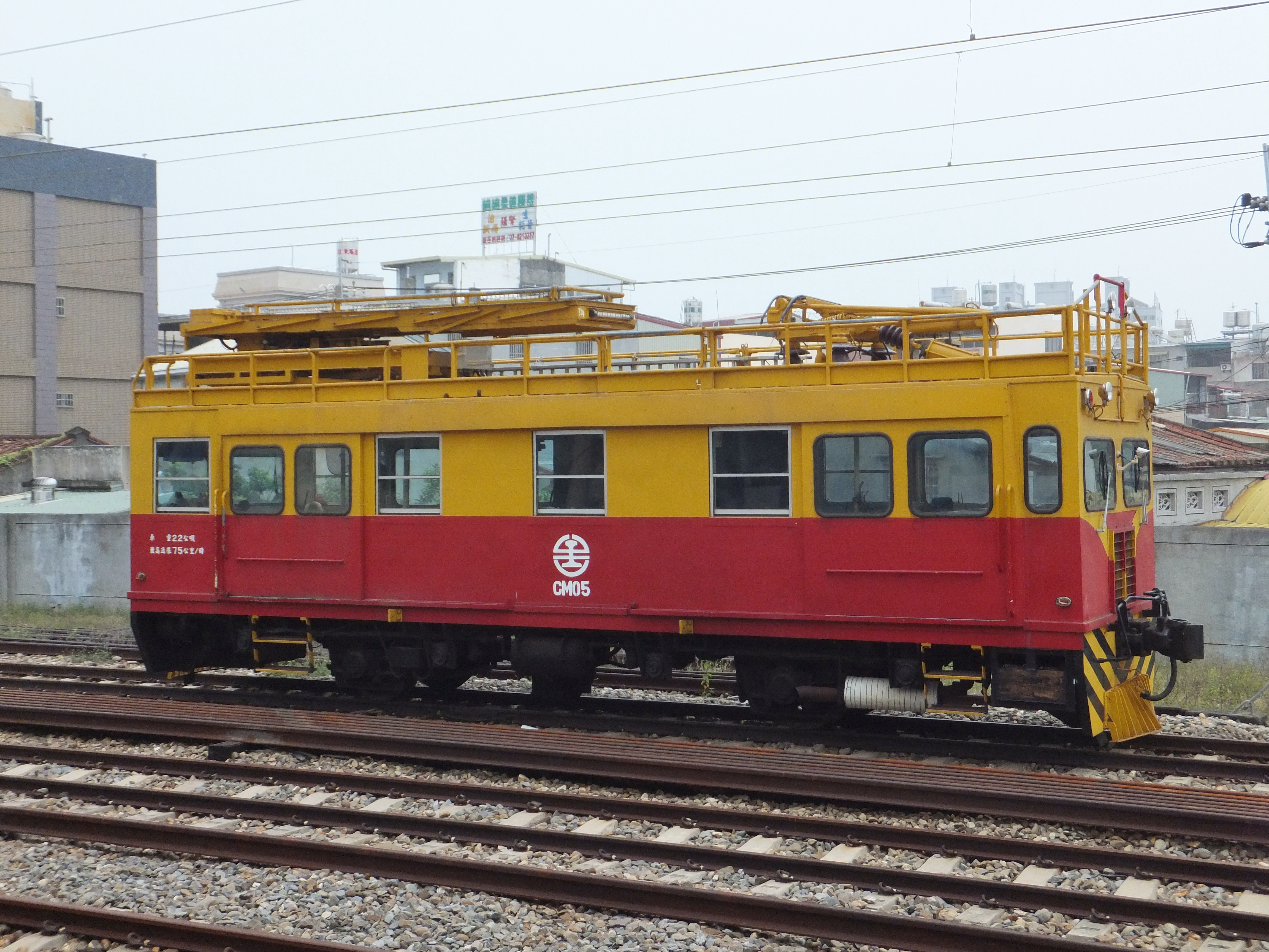 臺灣鐵路管理局電車線維修車CM05，日本堀川工機（HORIKAWA KOHKI）製，攝於高雄市岡山車站。